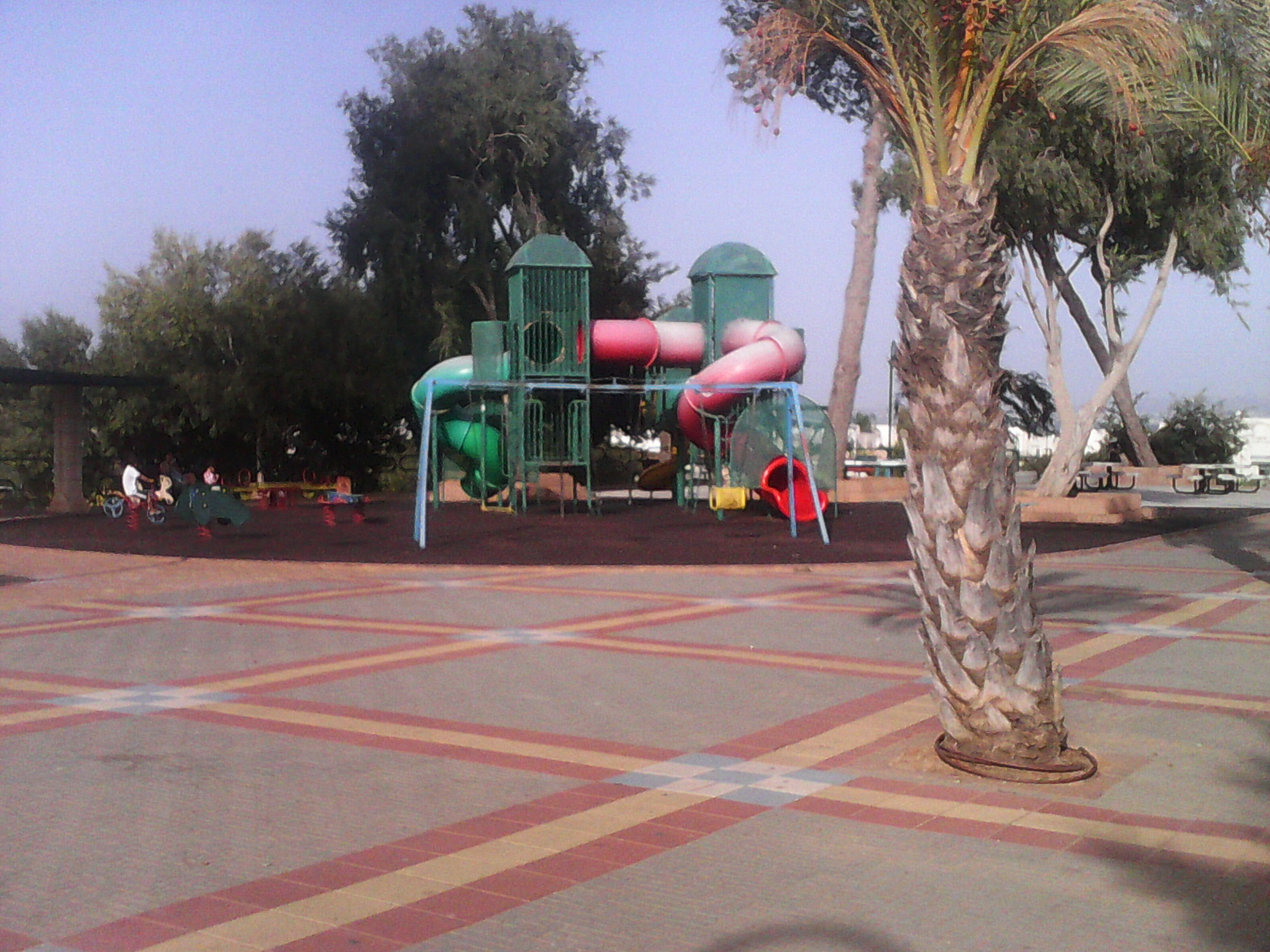 פארק חפציבה, כפר יונה.